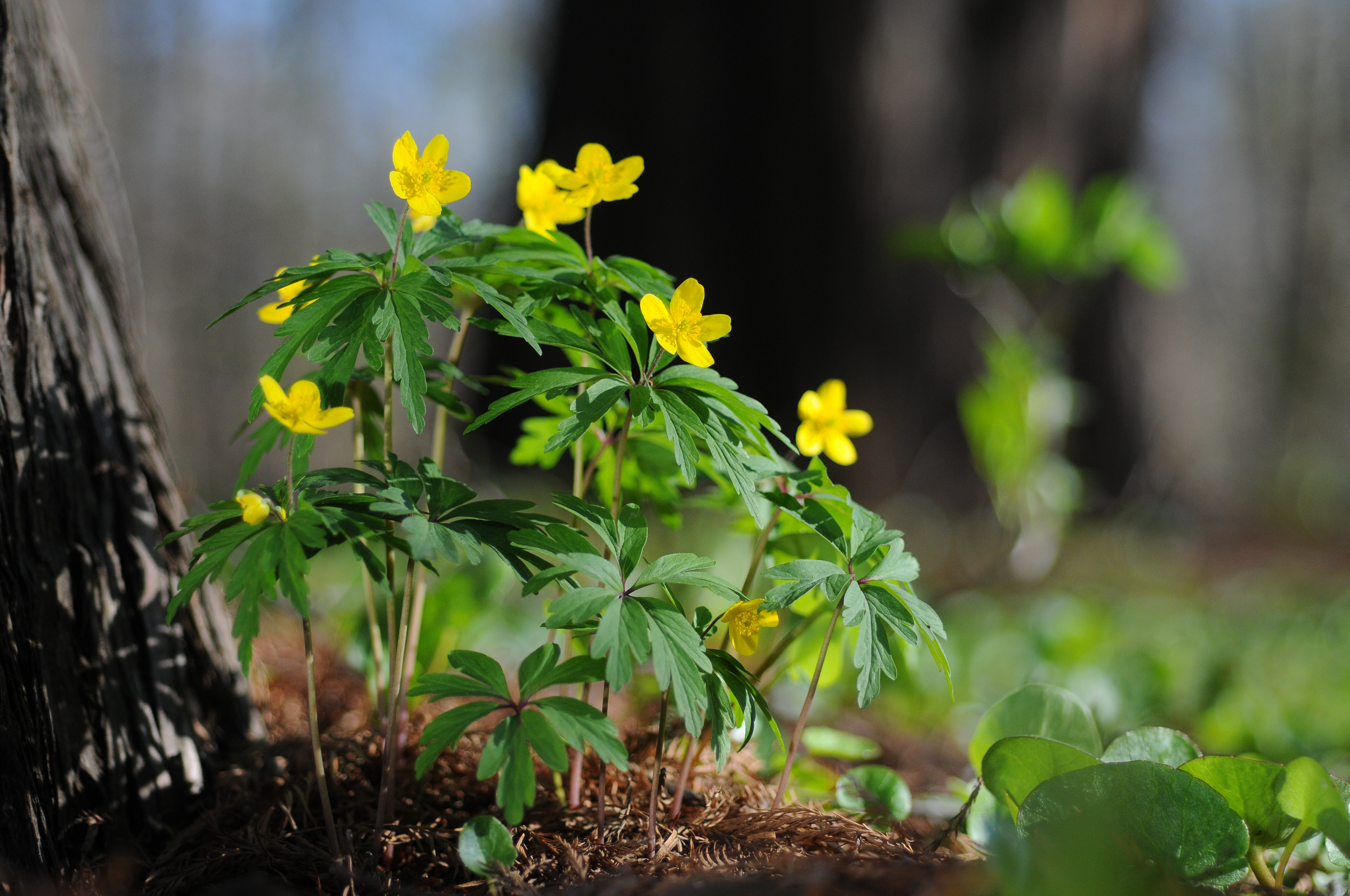 Anemona